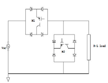 Circuito que utiliza tiristores controlados por mosfet para variar la potencia que le llega a la carga.